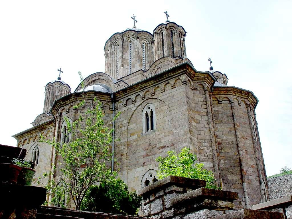 Mansija monastery, near Despotovac, Serbia/Monastère orthodoxe serbe de Manasija, près de Despotovac, Serbie